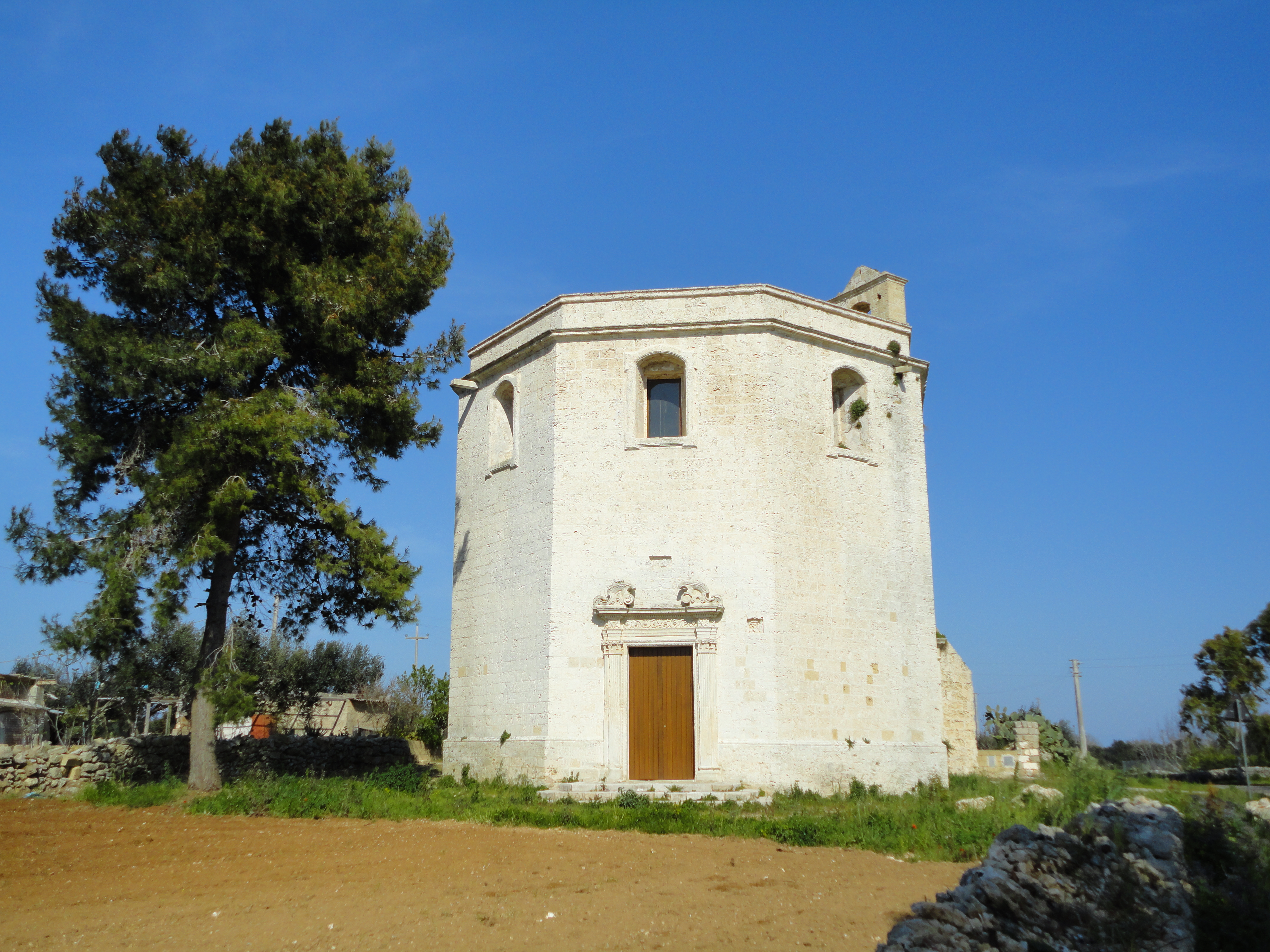 Chiesa di Costantinopoli Tricase, Lecce